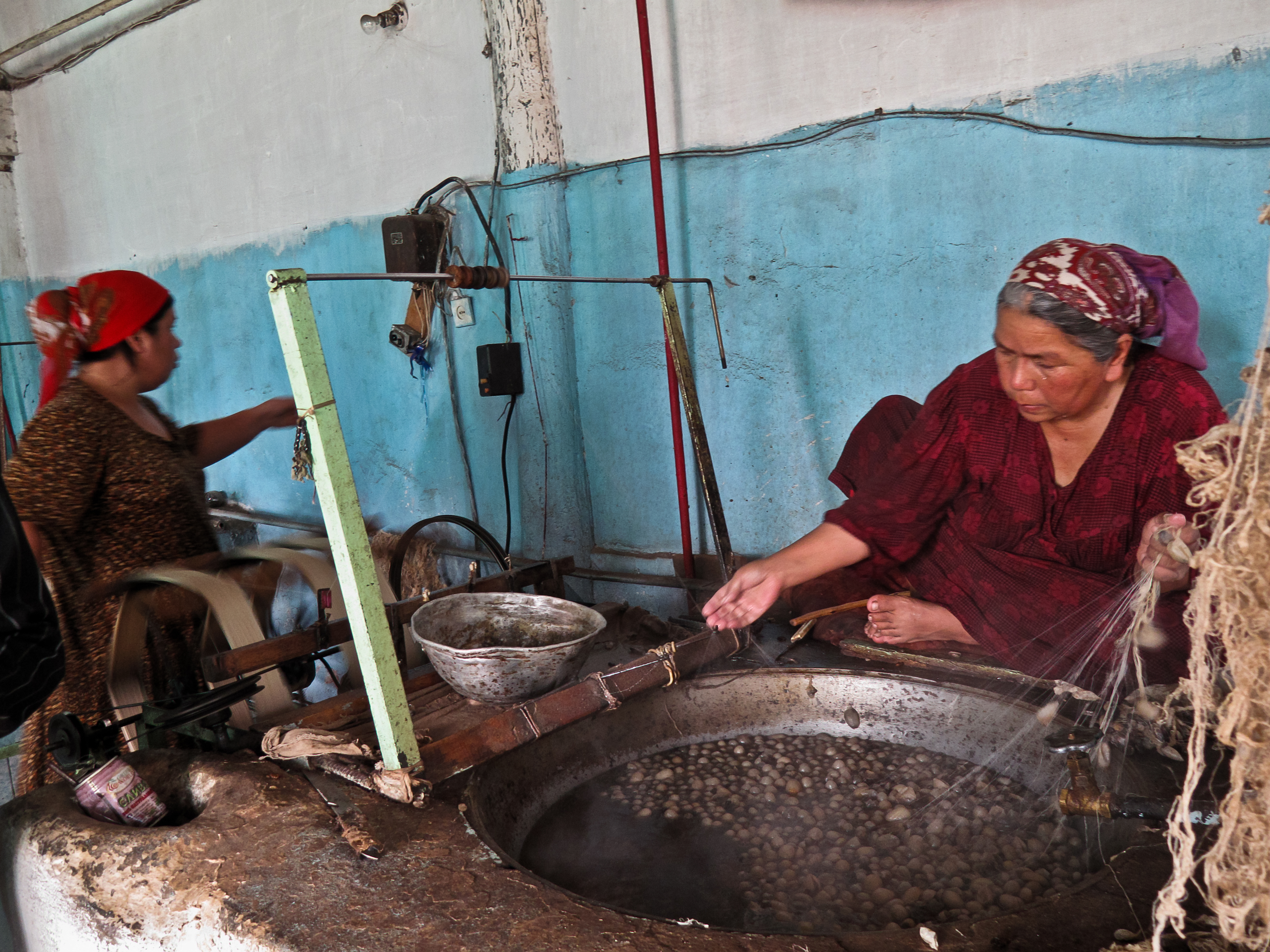 in Margilan, Uzbekistan